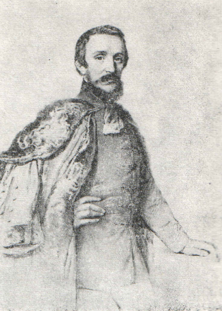 Lajos Tarczy, professor of philosophy and natural science in the Pápa Reformed College 1833-1881 Tarczy Lajos, a filozófia és a természettudomány tanára a Pápai Református Kollégiumban 1833-1881 között